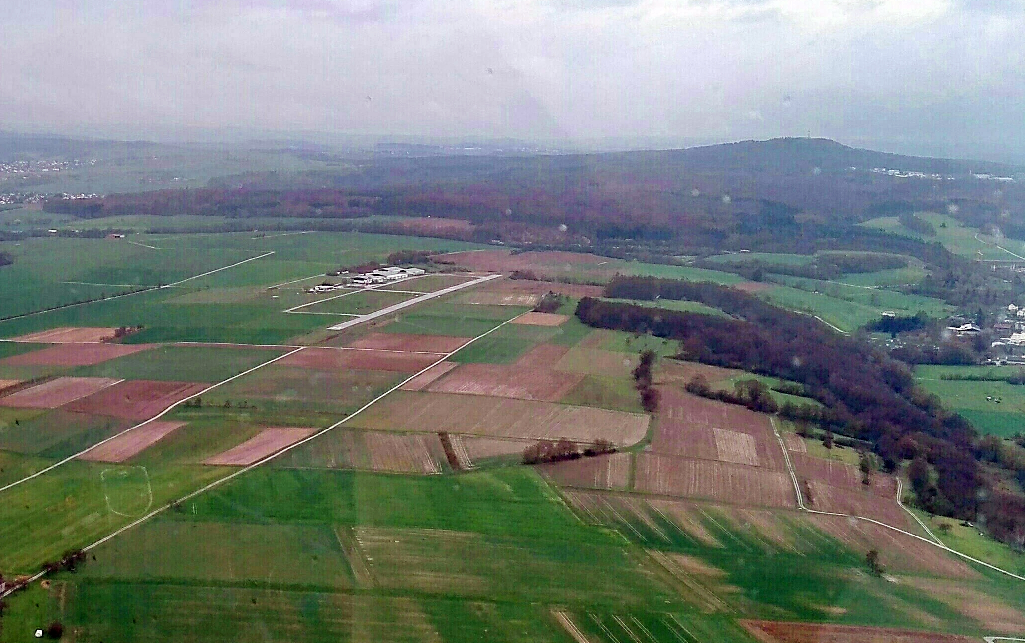 Der Flugplatz Gießen-Lützellinden, aus Pilotensicht, im rechten Queranflug auf die Piste 25